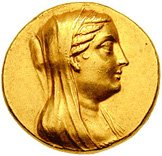 Portret van Berenice II op een gouden octadrachme (27,7g) geslagen na 241 v. Chr.. De keerzijde heeft het opschrift BERENIKHE BASILISSHS. Bron: Classical Numismatic Group, Inc. (CNG)